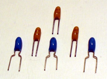 Perlenförmige Tantal-Elektrolytkondensatoren